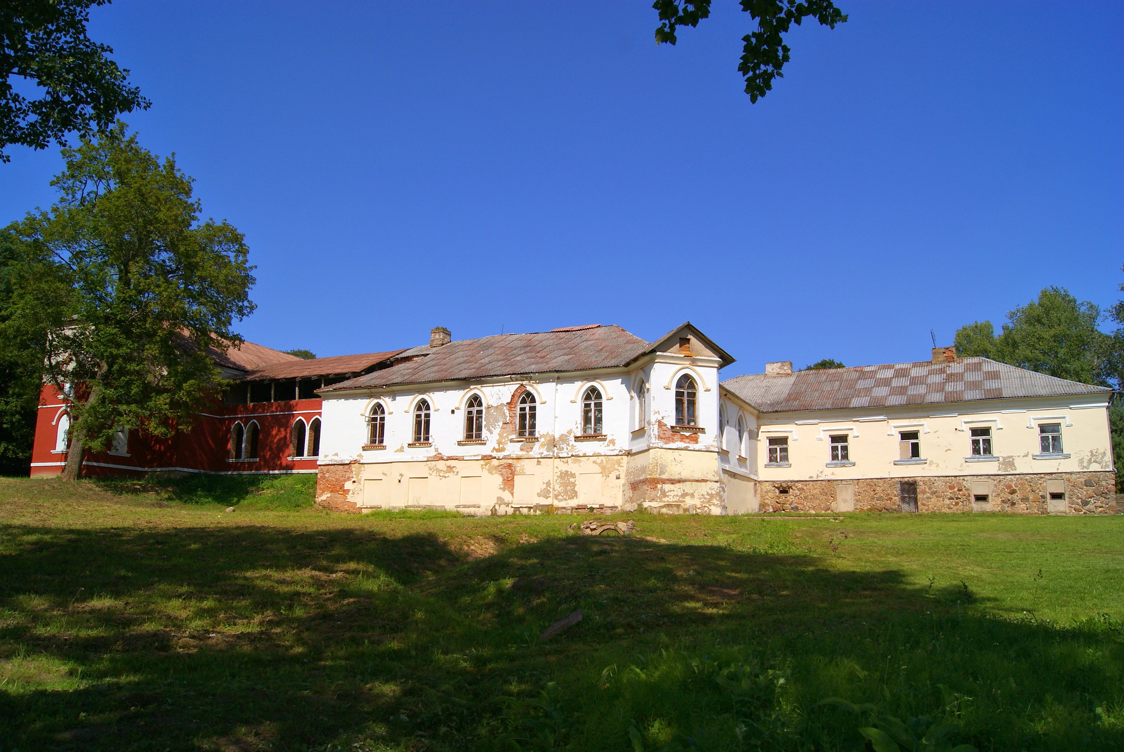 Antanaše manor